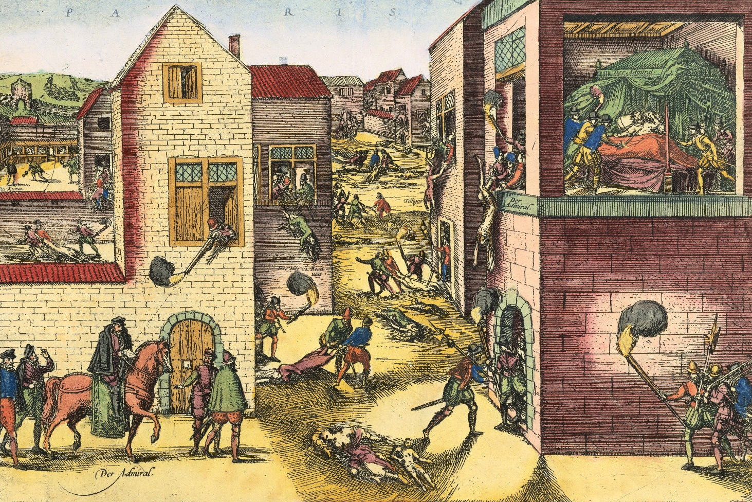 Assassinat de Coligny et massacre de la Saint-Barthélemy (1572). Département des estampes et de la photographie de la BnF.